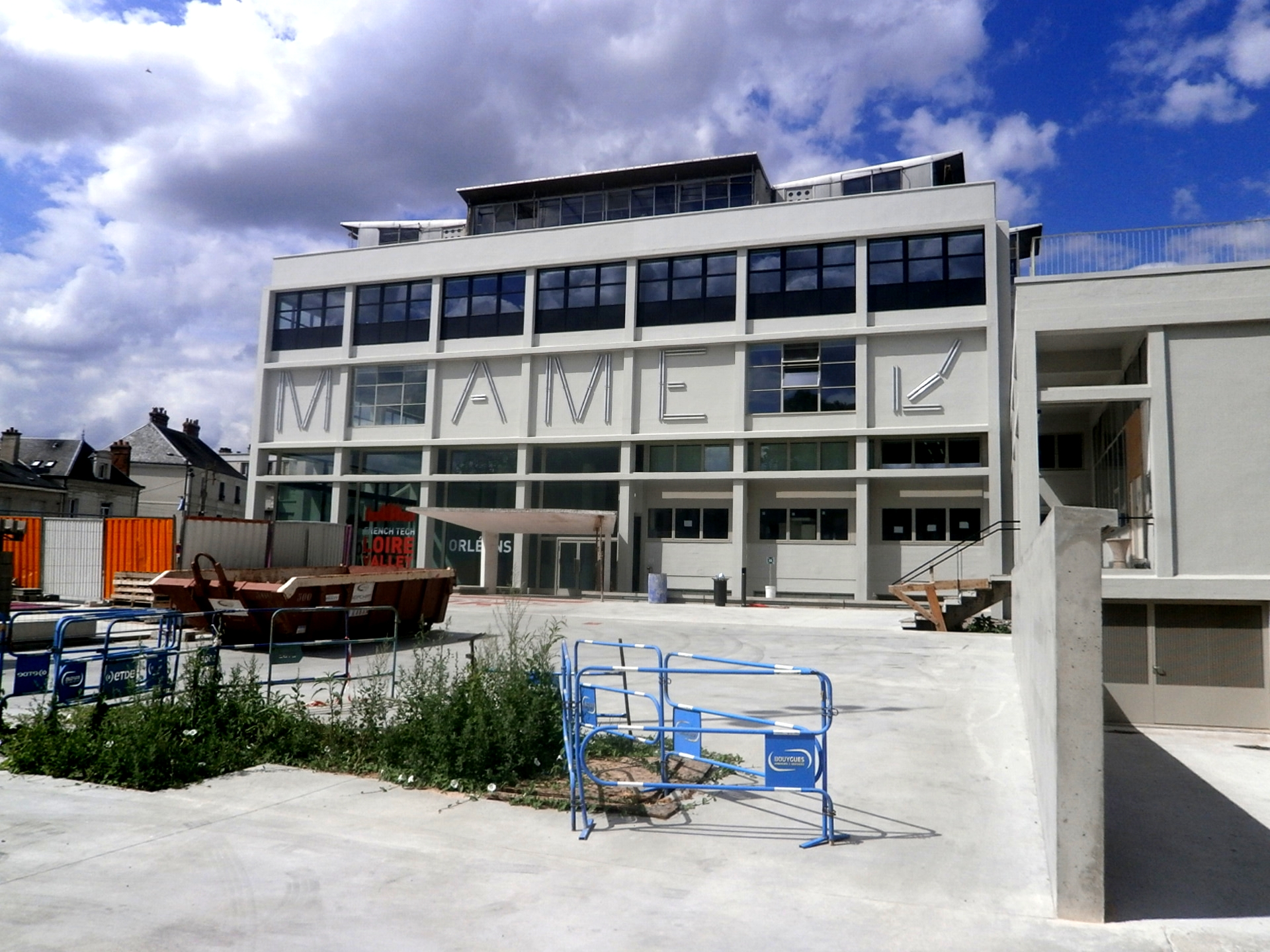 L'ancienne usine Mame, Tours